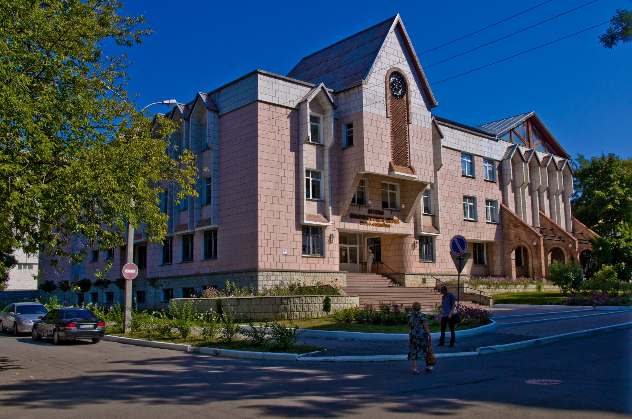 Детская художественная школа им. А.Ф,Фойницкого в Тирасполе. Школа располагается на перекрёстке улиц: Манойлова и Розы Люксембург, в непосредственной близости от УВД города Тирасполь и Министерства Государственной Безопасности ПМР.